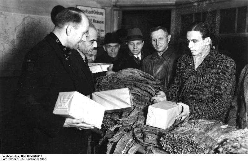 Berlin, Tabakumtausch Illus-Bittner Zigaretten für Tabakblätter: In Berlin können auch in diesem Jahr die Kleinstpflanzer ihren Tabak aus der Ernte 1947 in Tabakerzeugnisse eintauschen. Als Kleinstpflanzer gilt derjenige, der 99 und weniger Tabakpflanzen angebaut und der Steuerbehörde Mitteilung gemacht hat, daß der Tabak nur für den eigenen Bedarf Verwendung findet. In den Umtauschstellen erhält der Kleinspflanzer für jedes Kilogramm dachreifen trockenen Tabaks zwei Mark und 500 Zigaretten zum Banderolenpreis. U.B.z.: Kleinstpflanzer beim Umtausch ihres Rohtabaks gegen Zigaretten. 14.11.47 966-47